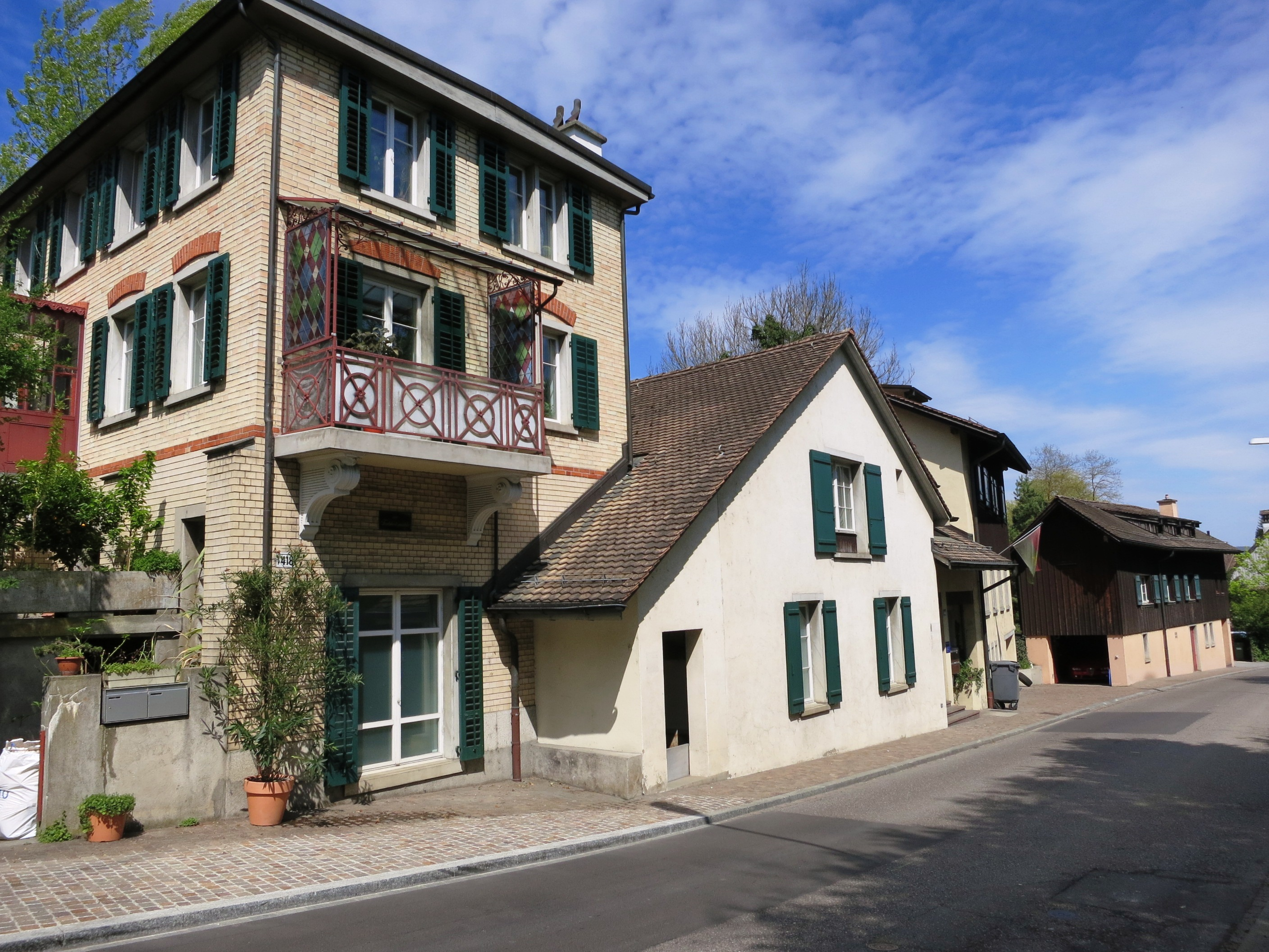 Farbholzmühle, Zürich-Albisrieden, Schweiz